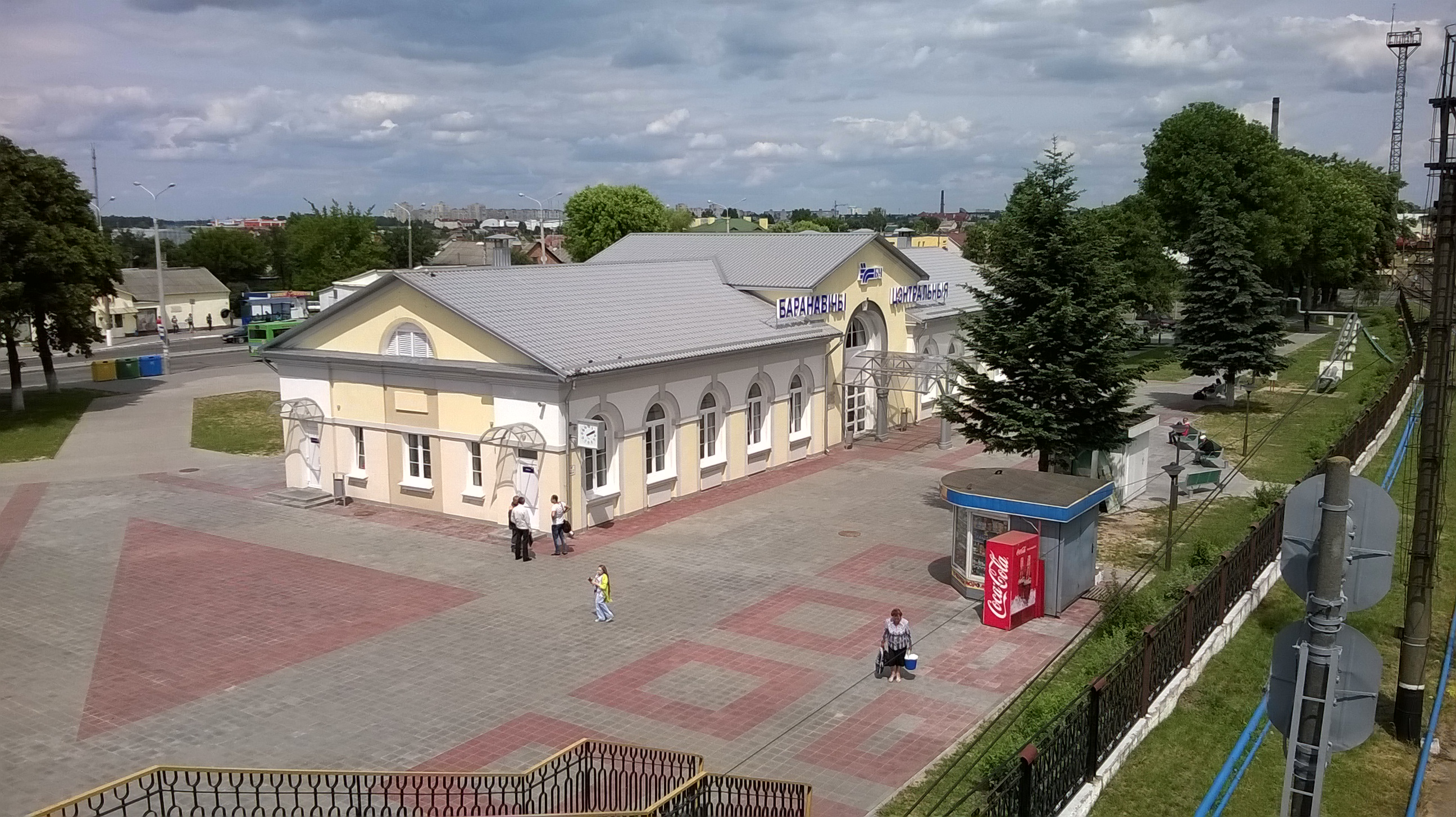 Беларуская (тарашкевіца): Чыгуначная станцыя Баранавічы Цэнтральныя.